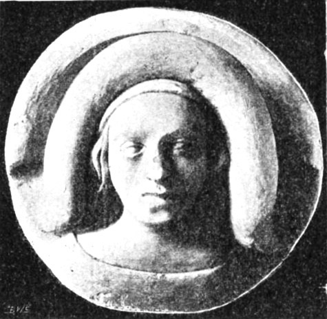 ilustracja z książki Zygmunta Glogera "Encyklopedia staropolska tom IV" publikacja Wydawnictwa Piotra Laskauera i S-ki Warszawa 1903. Zwornik krakowski, przedstawiający prawdopodobnie Aldonę Giedyminównę, pierwszą żonę Kazimierza Wielkiego